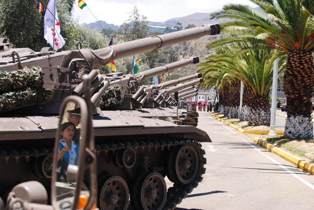 Tanques de bolivia en formacion para participar en un desfile